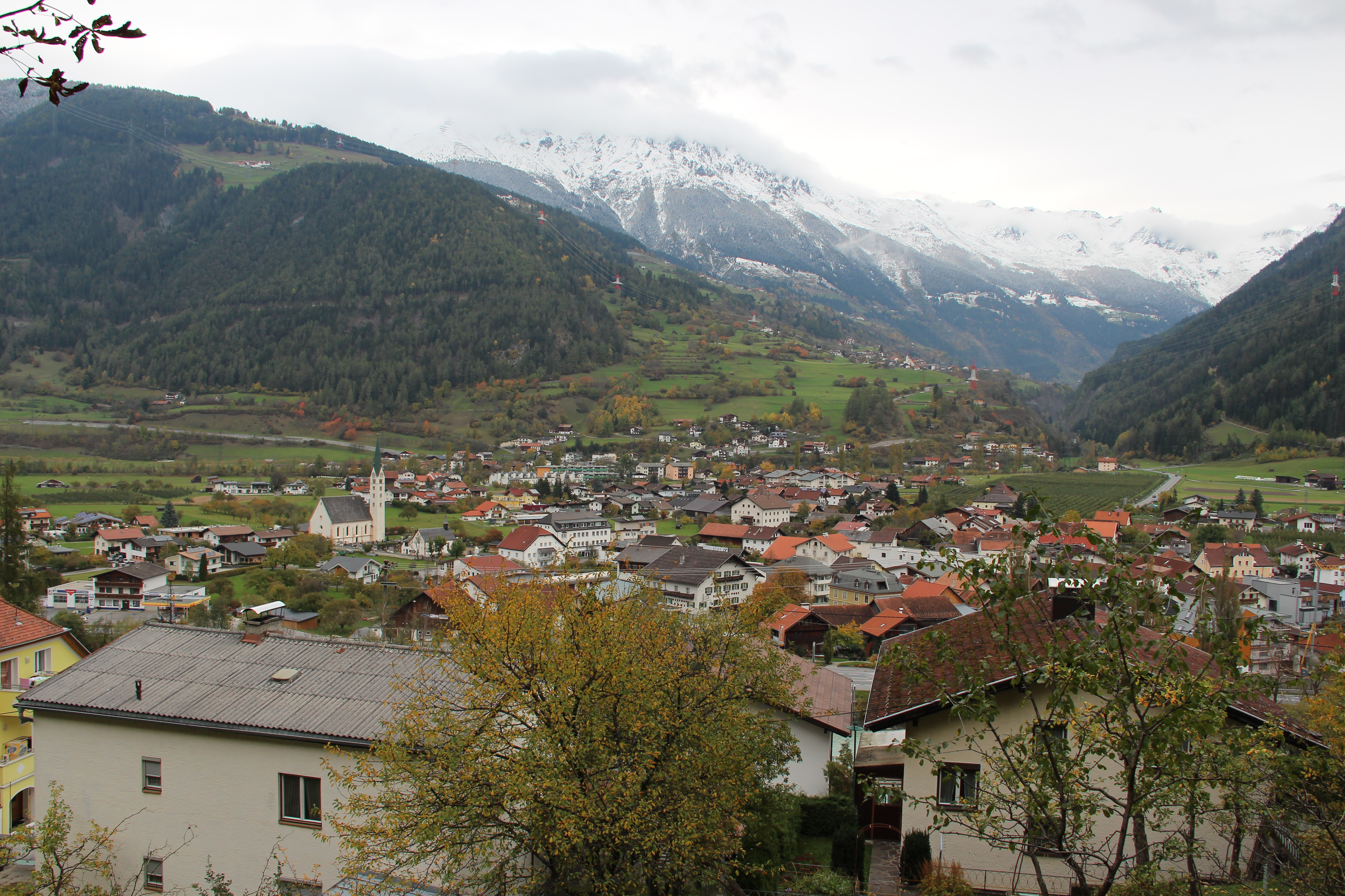 Ortsansicht von Prutz von Westen.